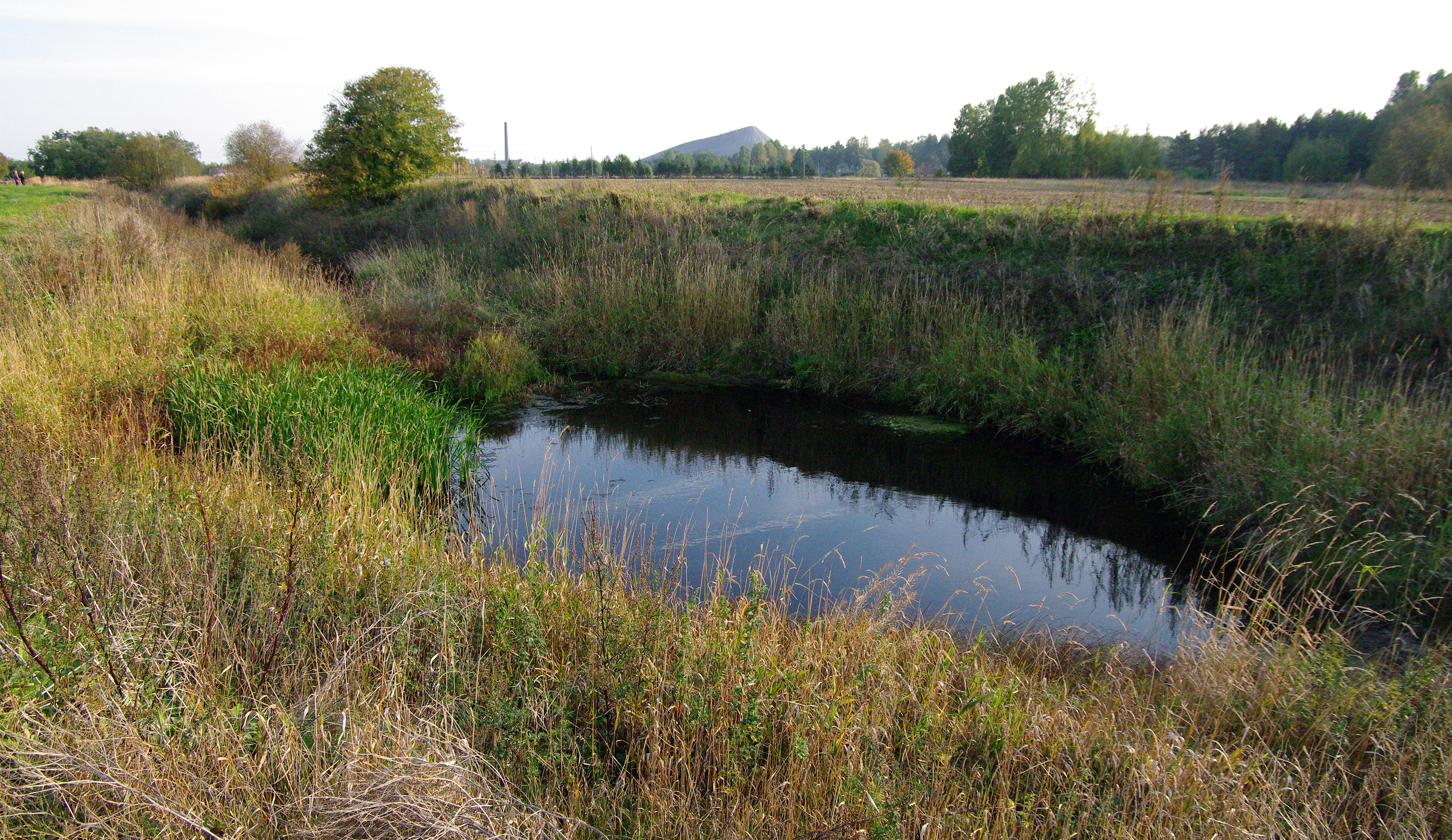 Uhaku karstiala, Pikkhaud